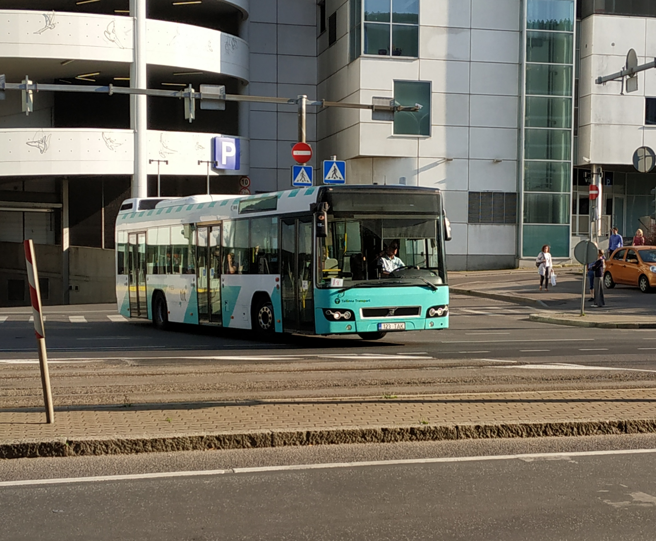 Autobus Volvo 7700 circulant à Tallinn